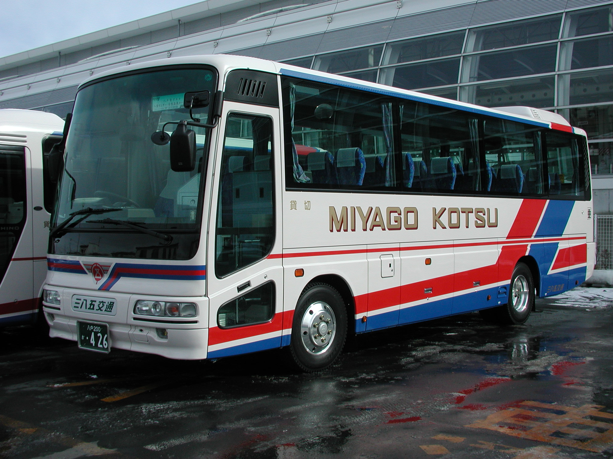 三八五交通（青森県ja:八戸市）：三菱ふそう・エアロミディMK（観光型） 八戸駅西口にて